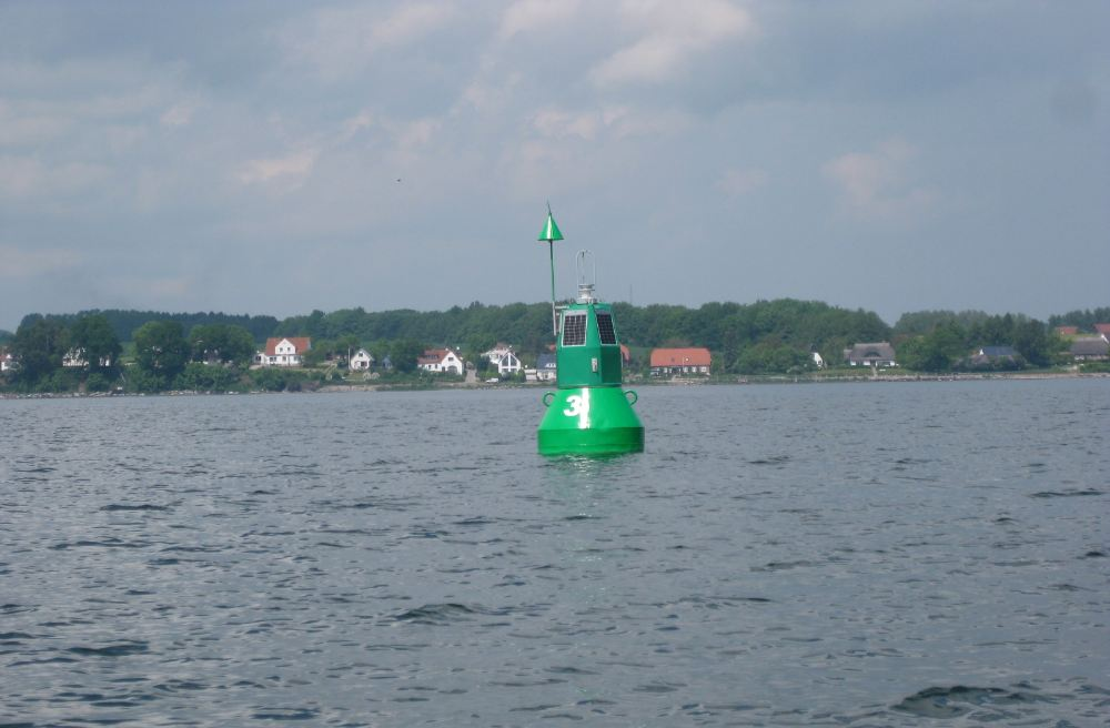 Neuendorf vom Wasser aus. Fotografie von Süden aus etwa 800 Meter Entfernung